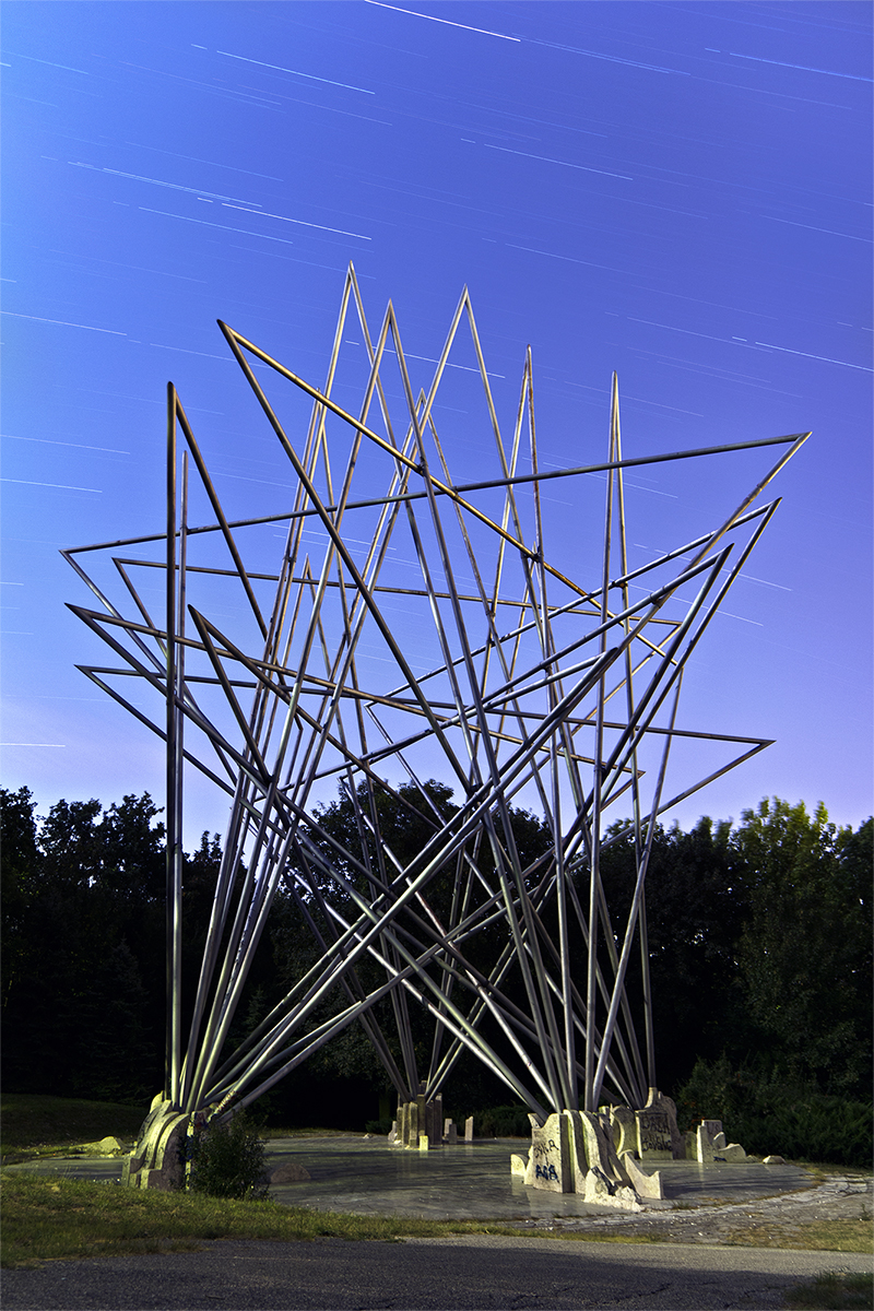 spomenik ZVEZDA cacalica